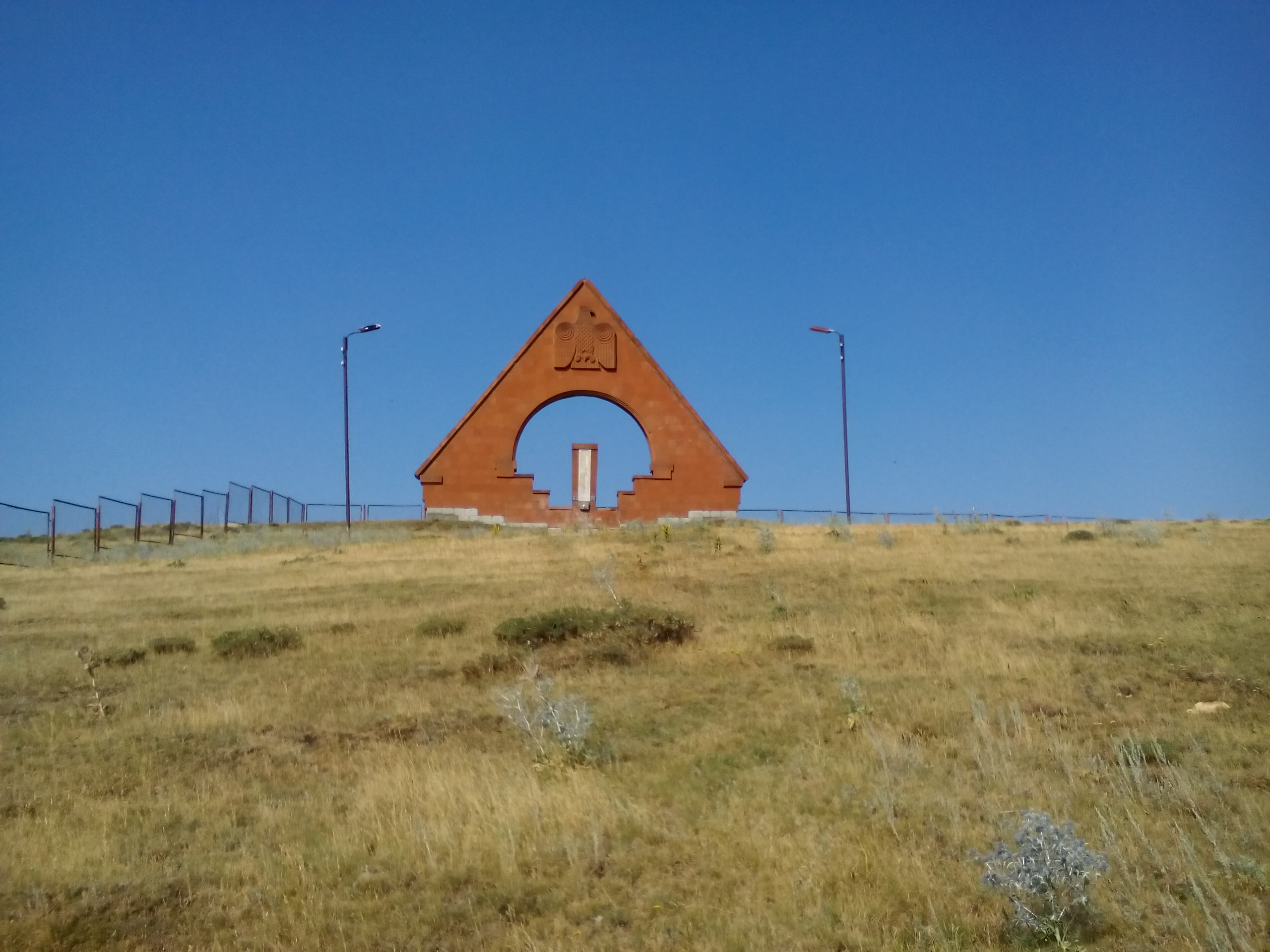 Մեծ Հայրենականի հուշարձան